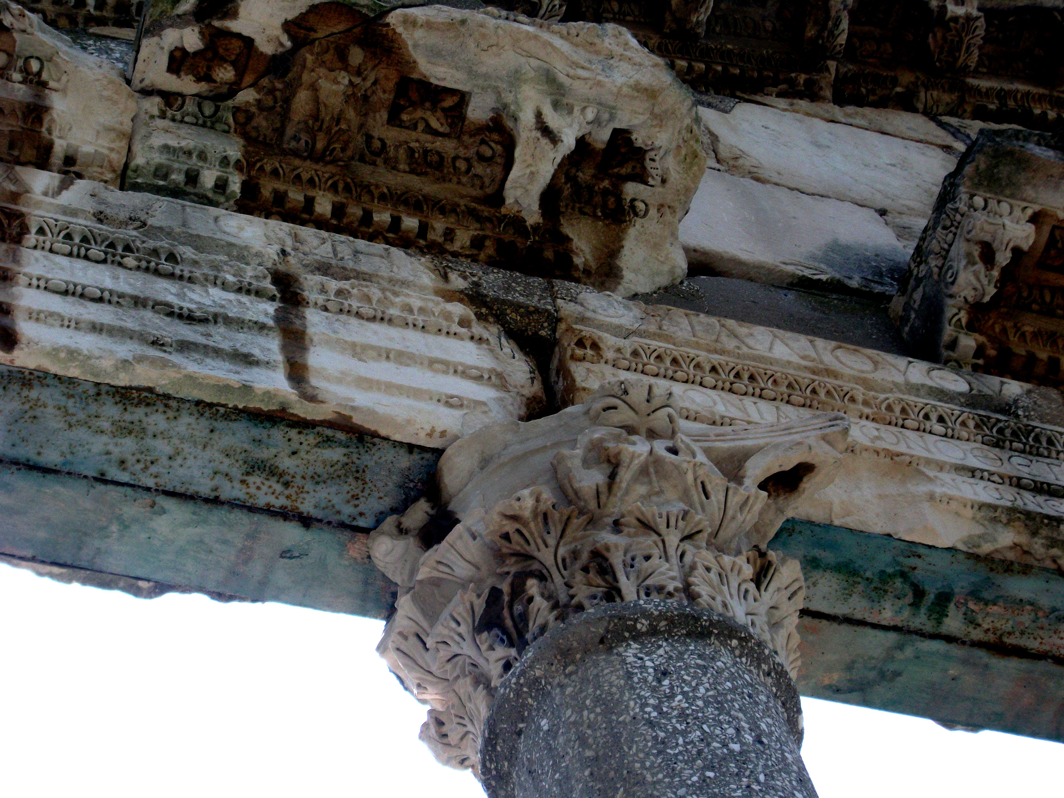 Parku Arkeologjik I Apollonisë